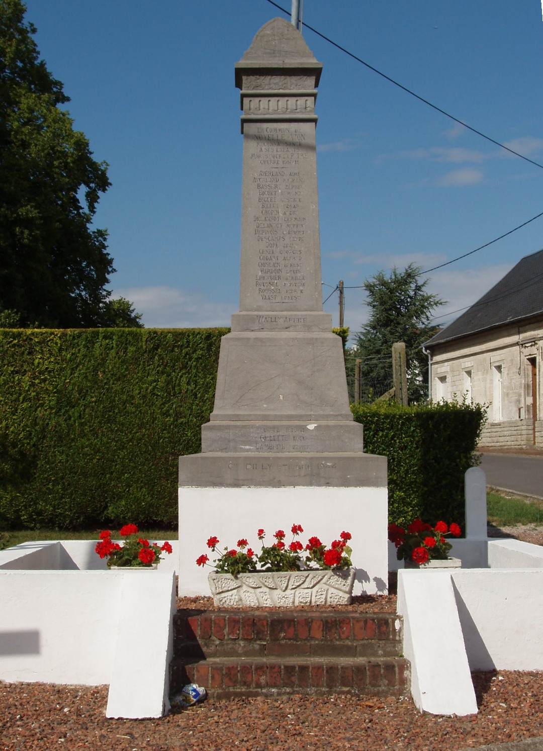 Commune française de Noyelle-Vion dans le département du Pas-de-Calais en France - Monument aux Morts